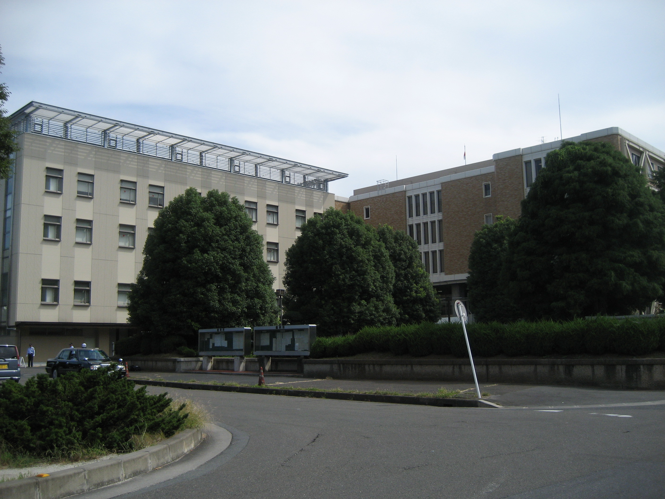 さいたま地方裁判所庁舎